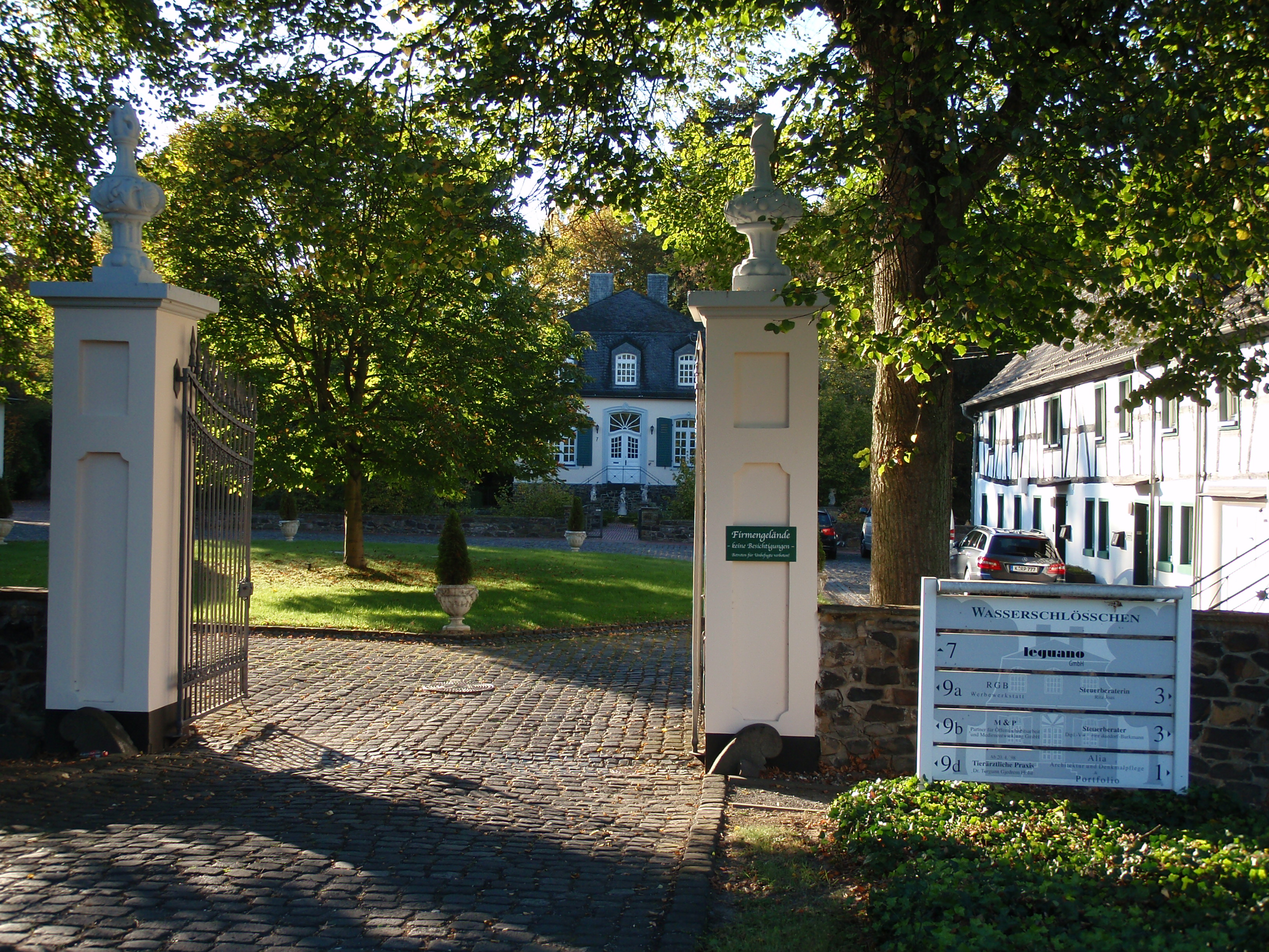 Einfahrt Schlossstraße 1–7 in Sankt Augustin-Birlinghoven, Deutschland.